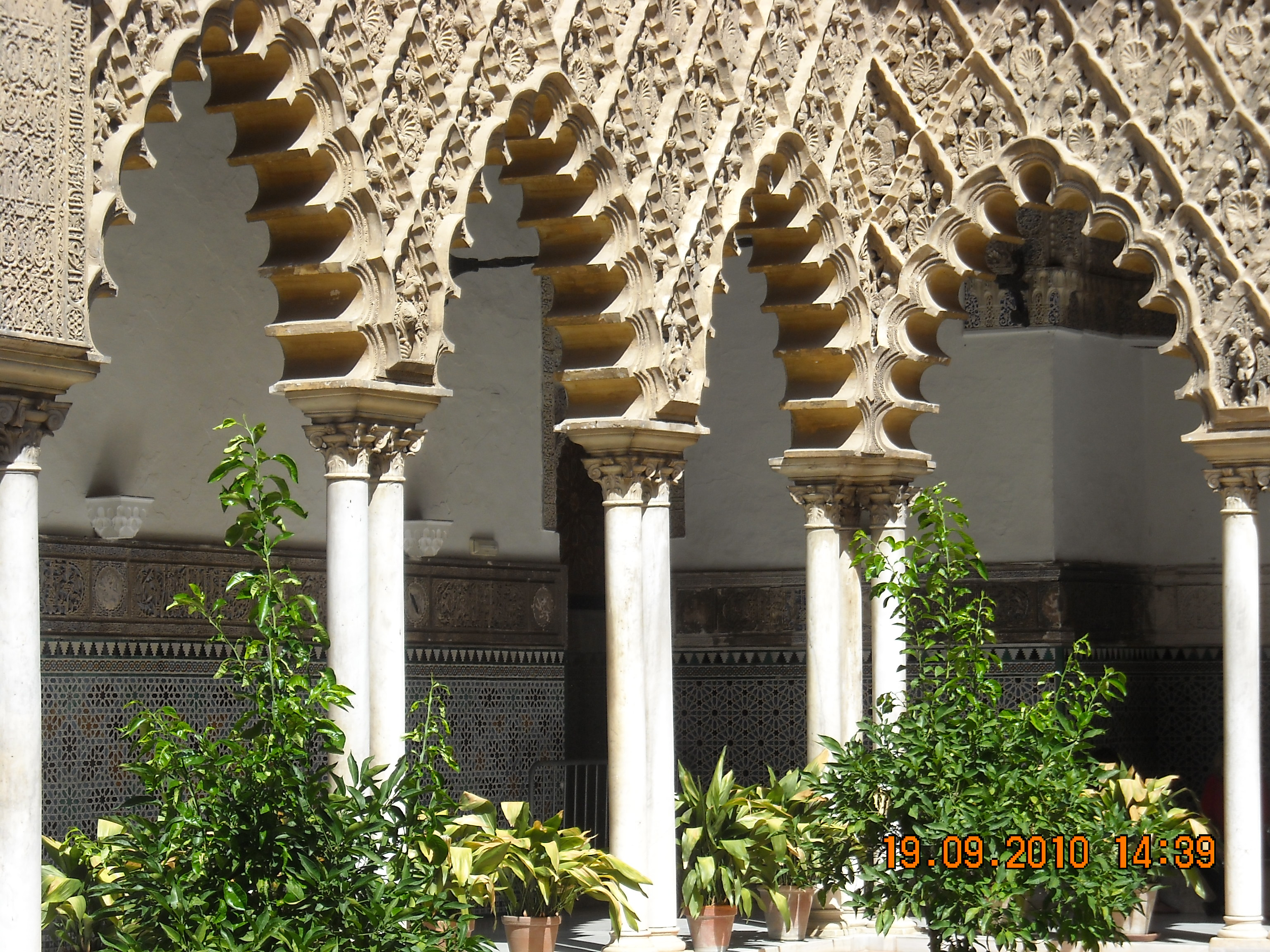 Tomada en pleno centro histórico.